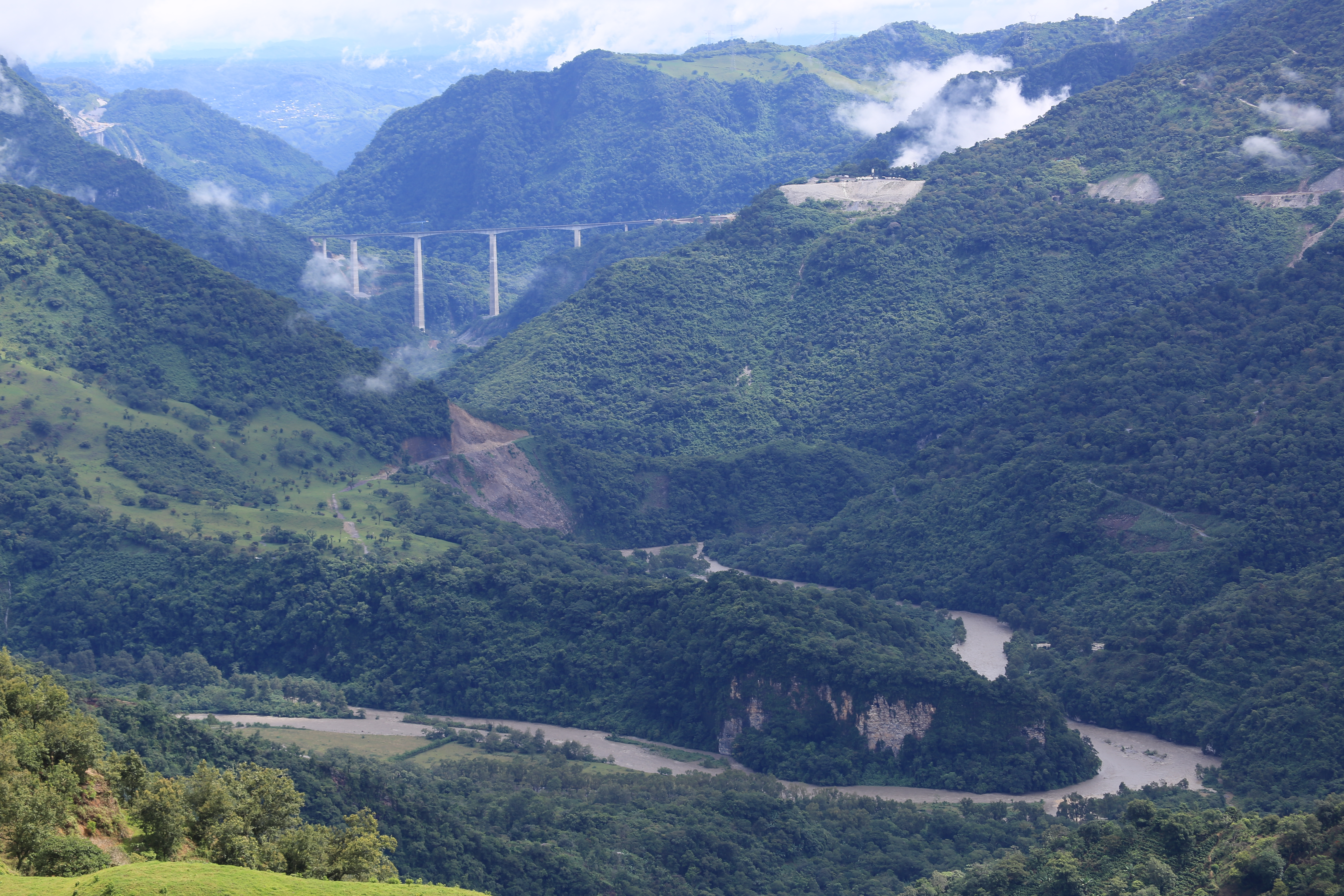 Puente Río San Marcos